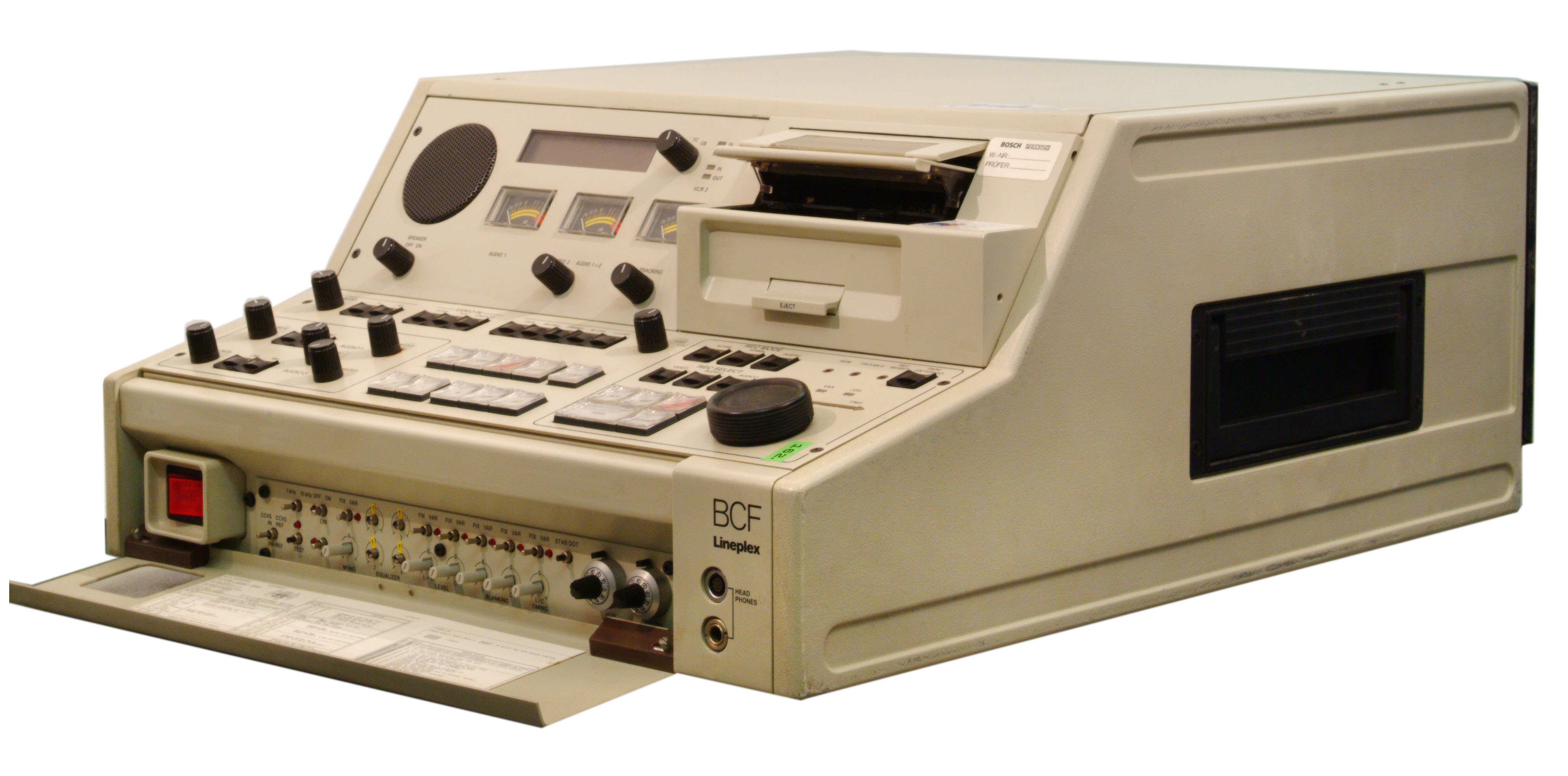 BOSCH Quatercam-Maschine (Lineplex)